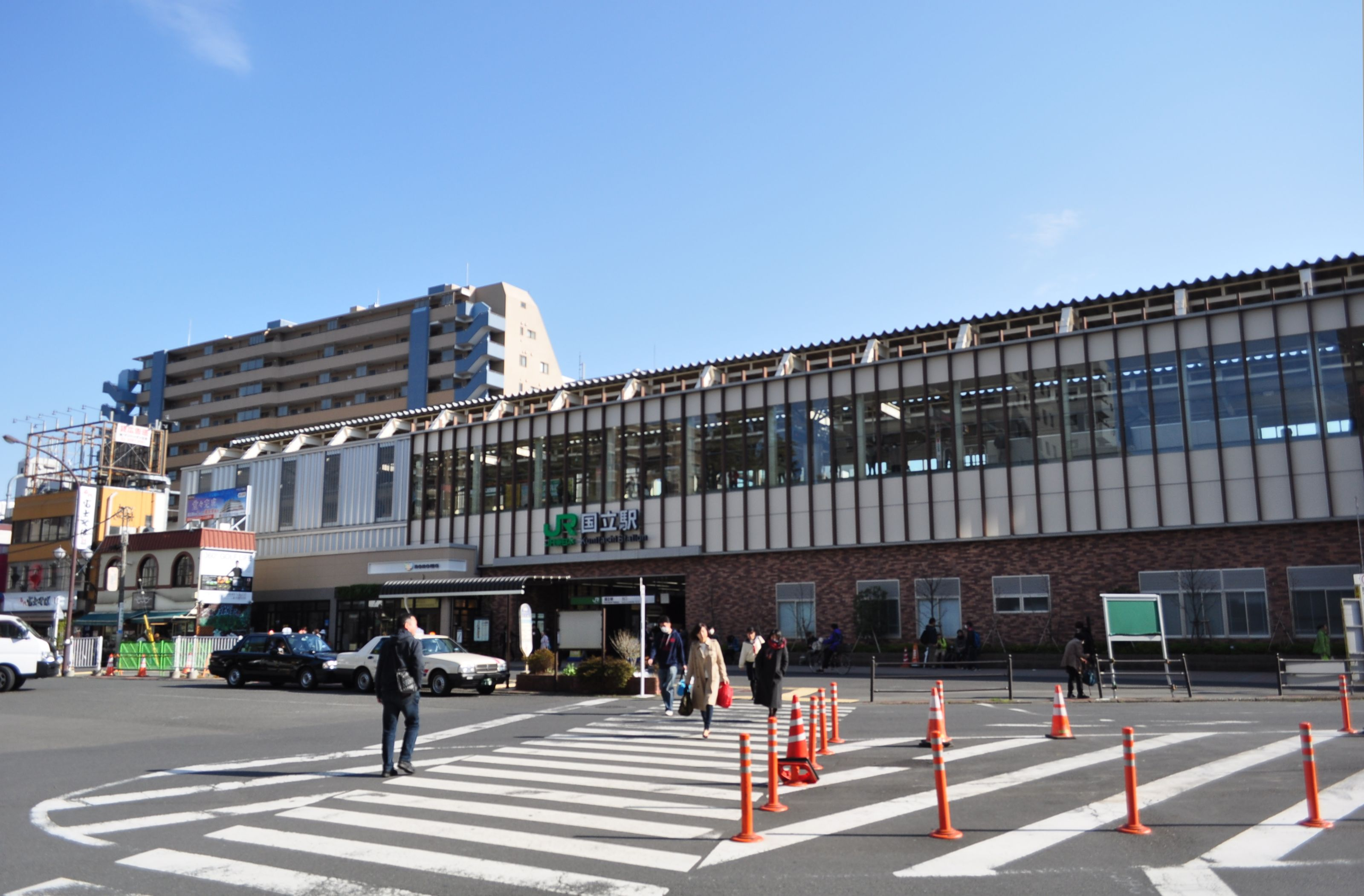 国立駅 北口